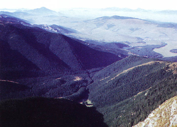 Oravská Magura (Slovakia)